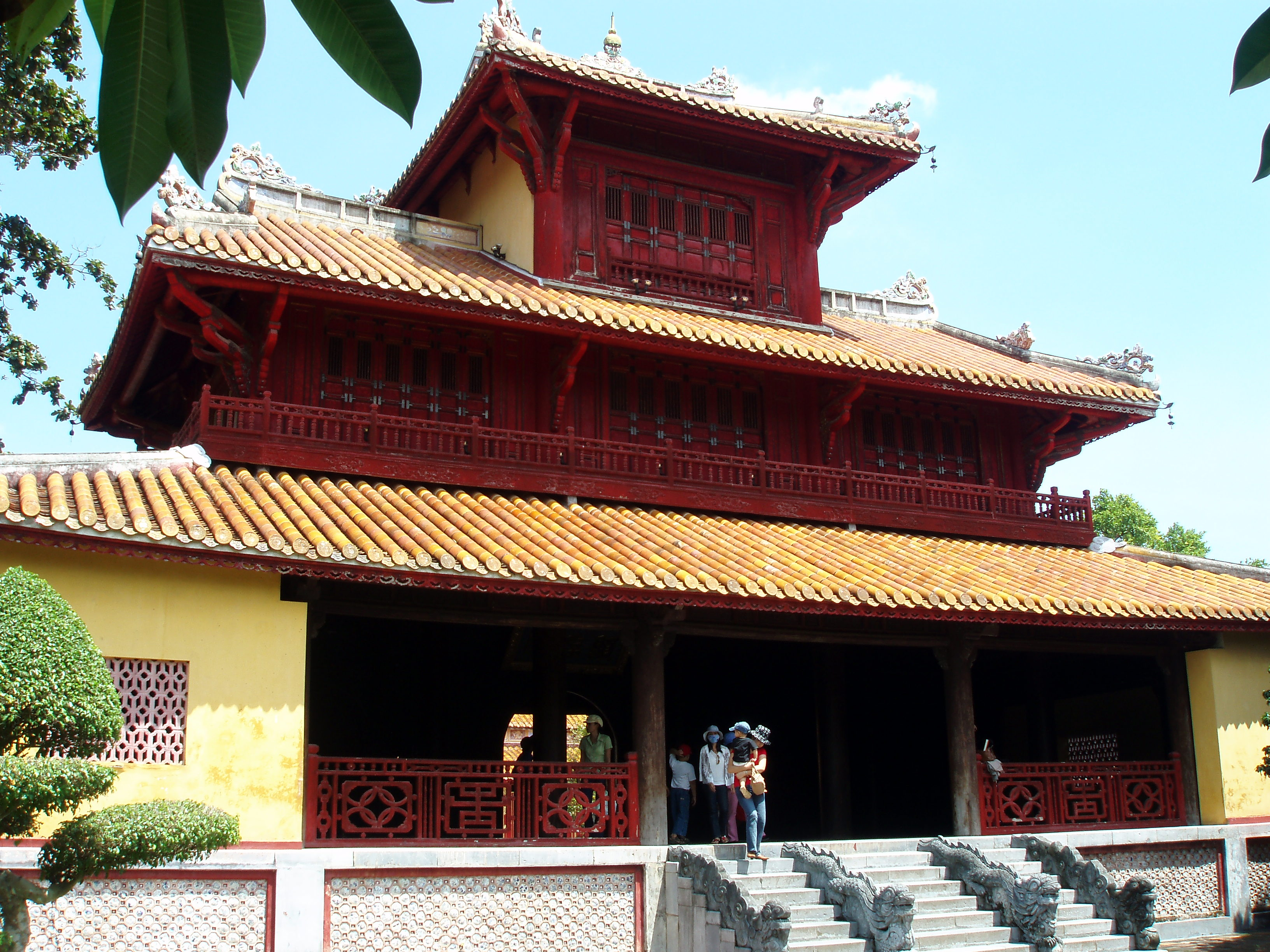 Citadel Hue